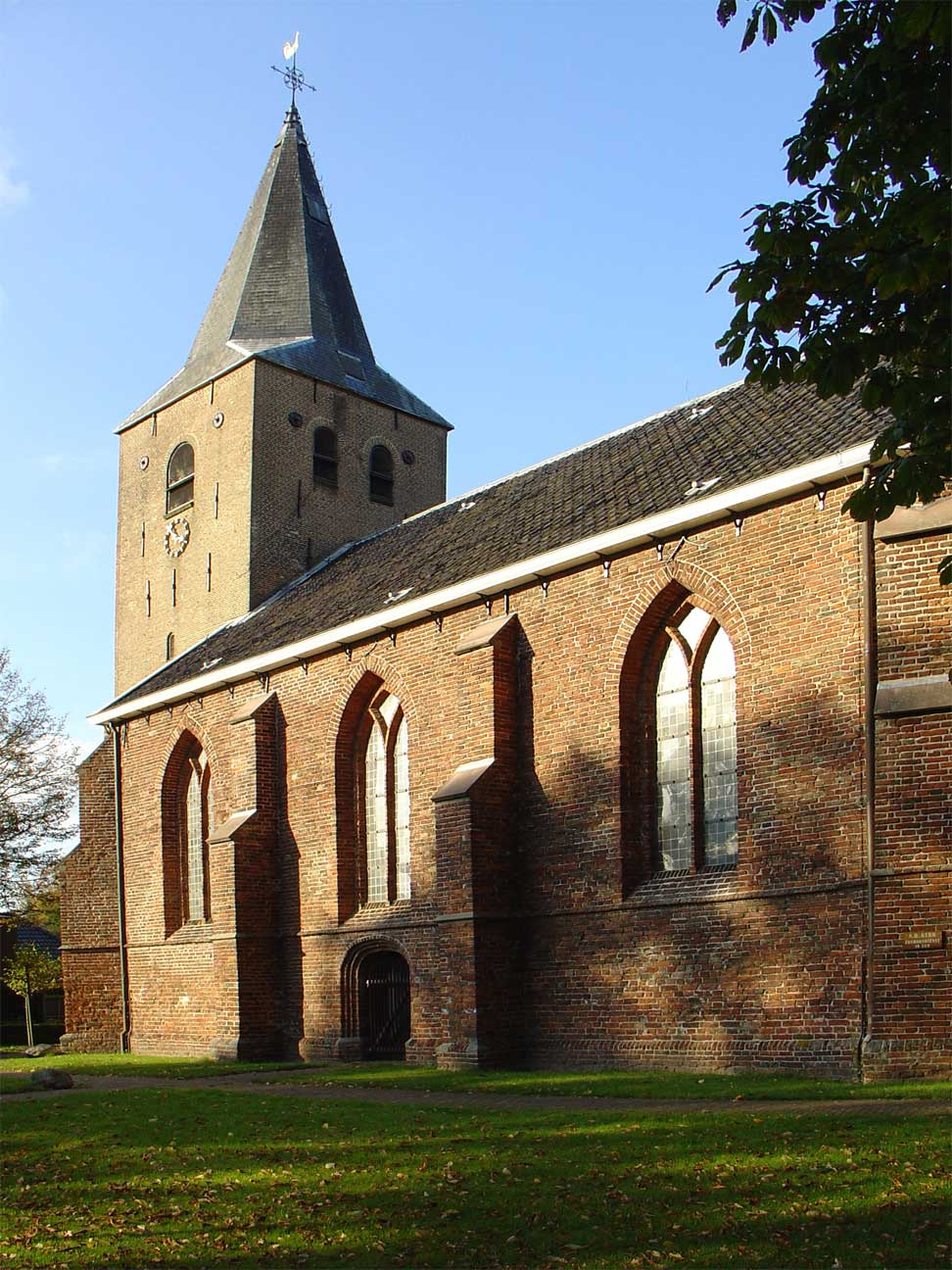 De kerk van Westerbork